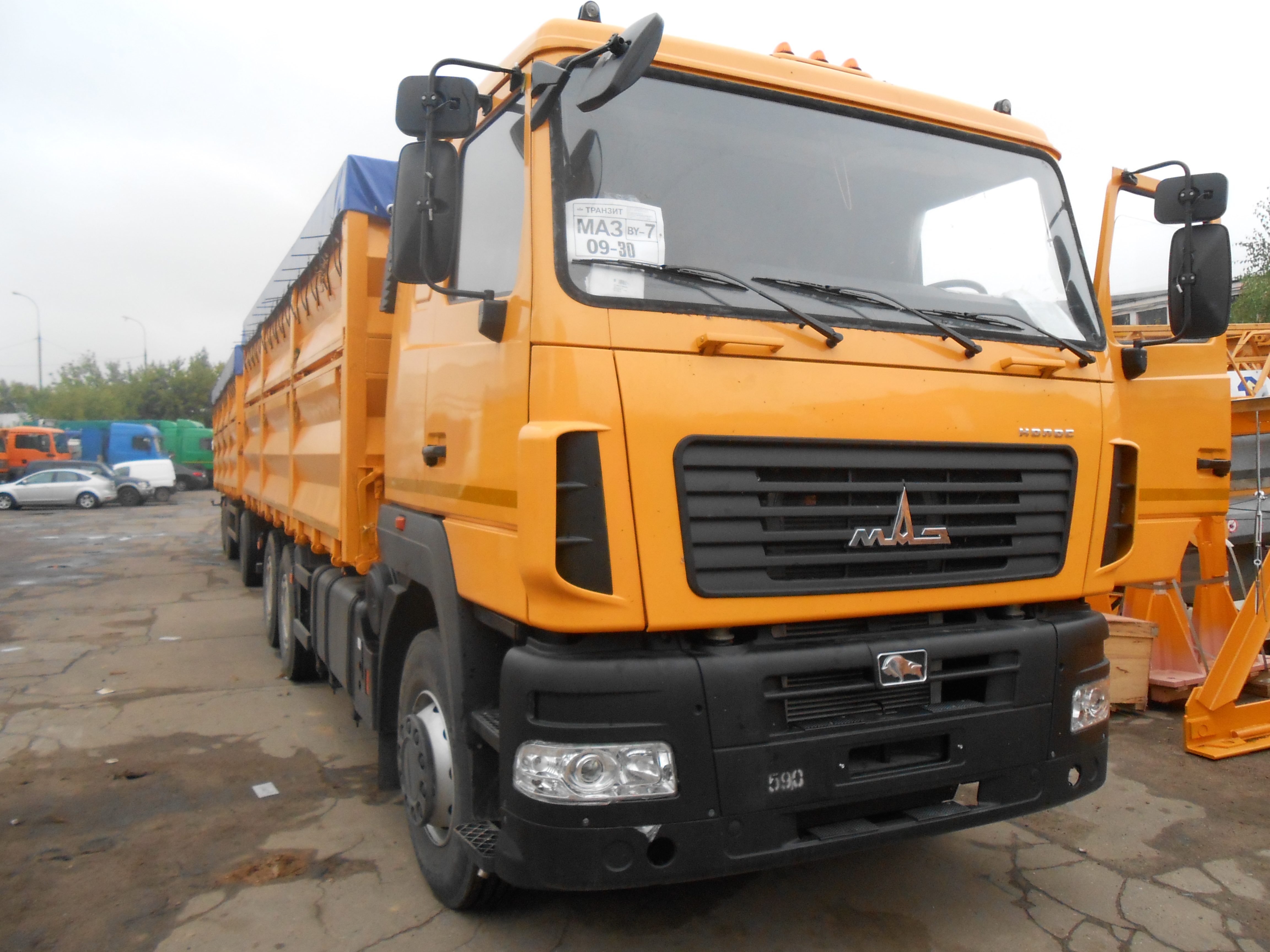 Зерновоз МАЗ 6501А8-325-000